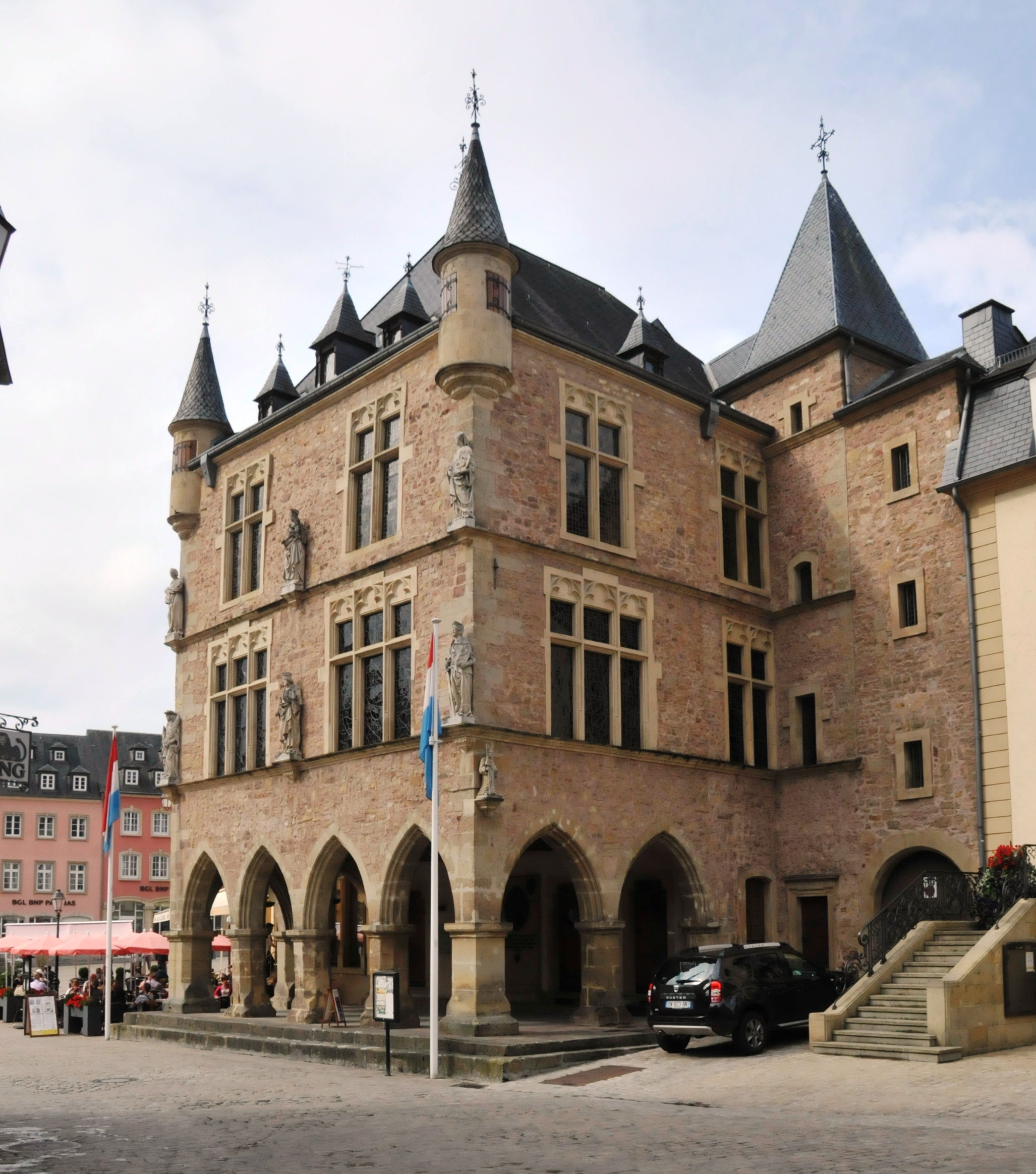 Echternach, Dënzelt